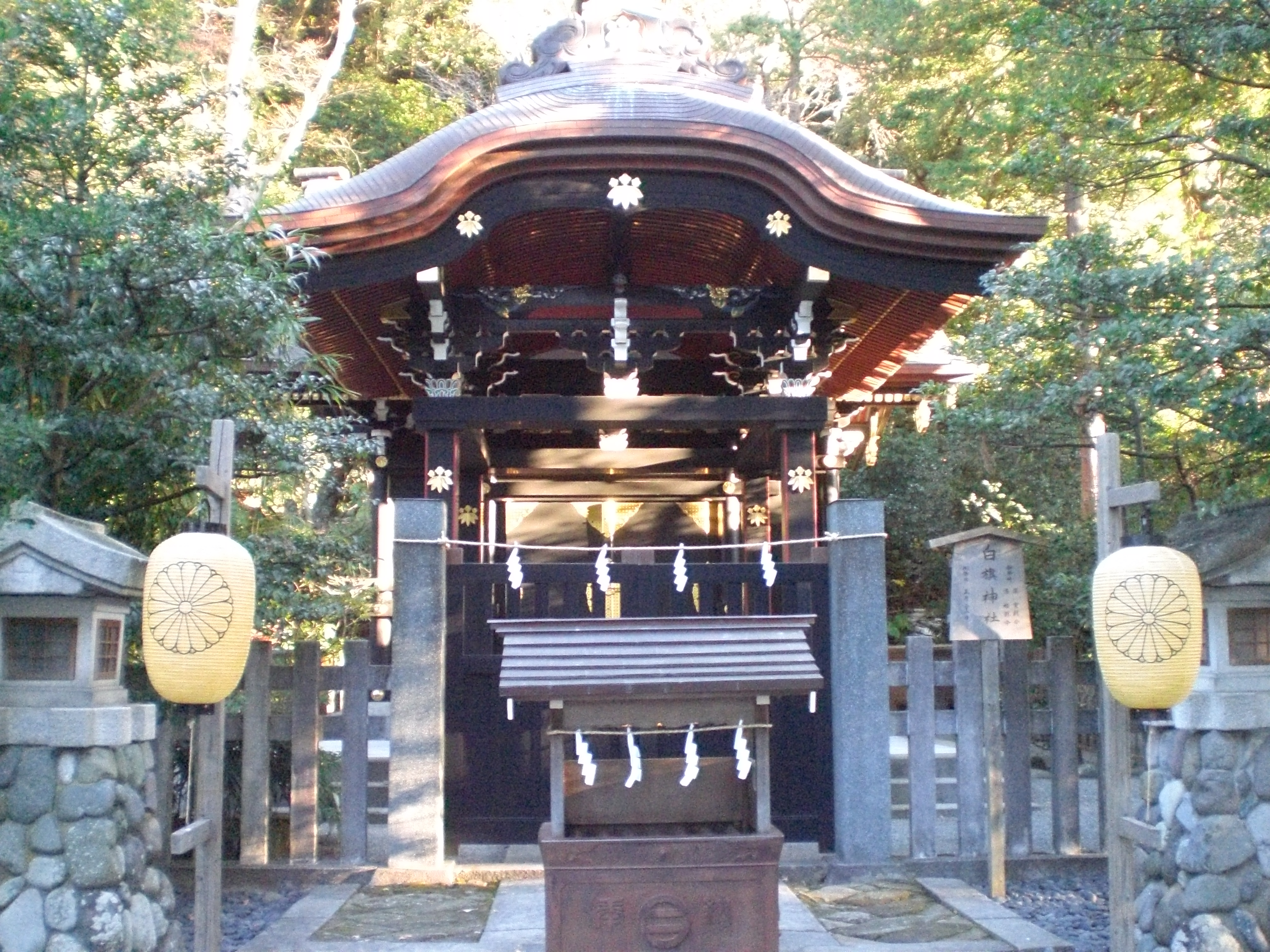 鎌倉・鶴岡八幡宮の境内にある白旗神社です。